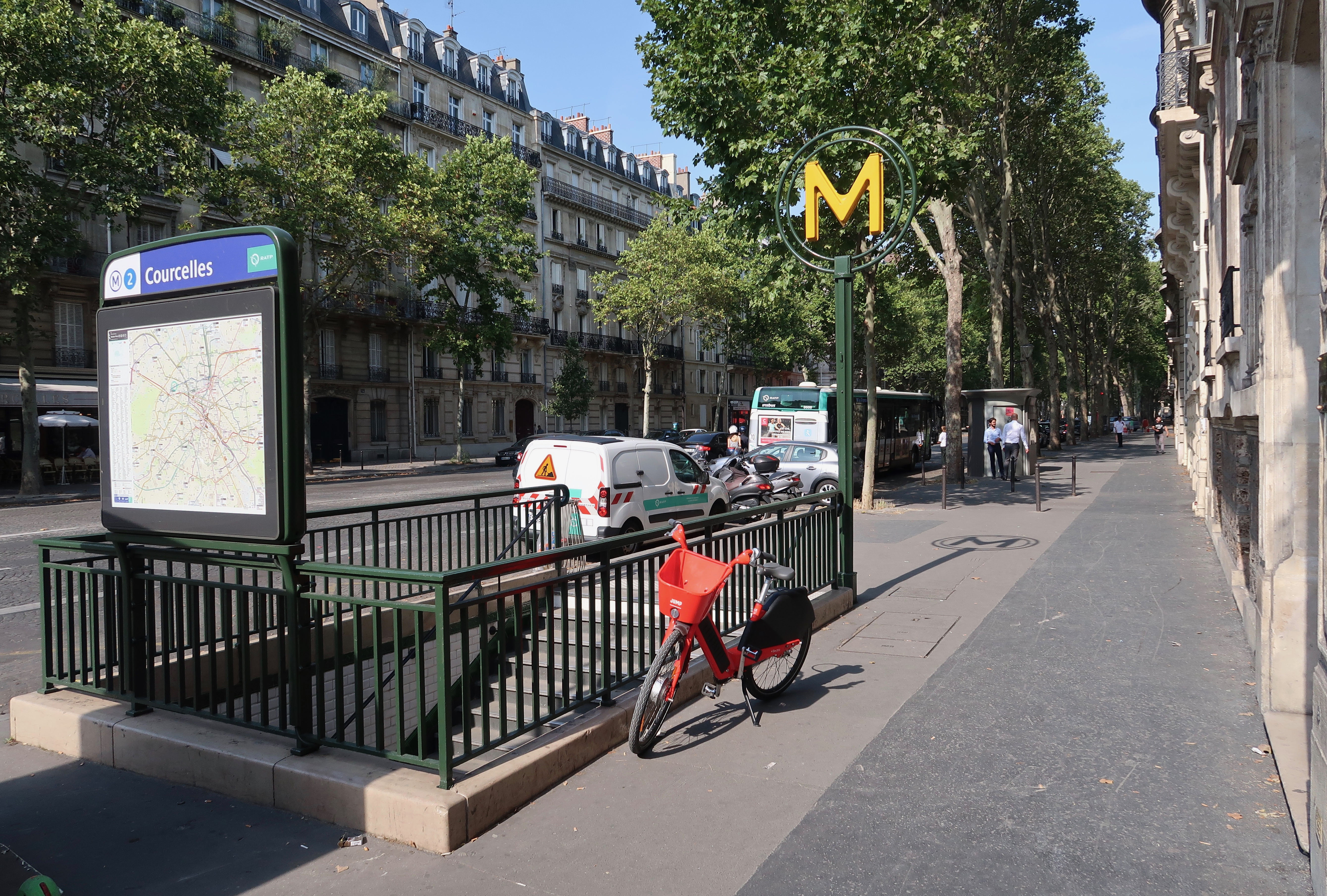 Courcelles (métro de Paris). Extérieur.